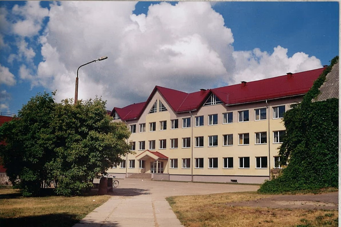 3 attēls